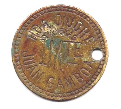 Ficha de hacienda equivalente a 1 mecate de "chapeo" (corte de maleza) expedida en la Hacienda Dziuché a finales del siglo XIX. A los peones de la haciendas se les pagaban sus labores con fichas las cuales eran canjeables con mercancía y víveres en las tiendas de raya. La Hacienda Dziuché y anexas, propiedad de un tal Juan Gamboa, se encuentra entre Hoctún y Cacalchén, Yucatán.